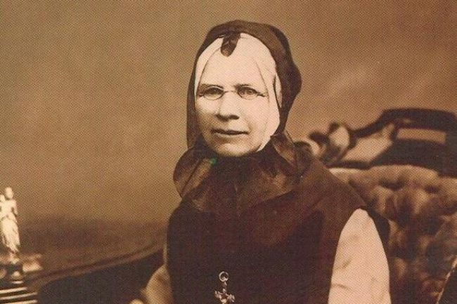 La fondatrice des Sœurs de la Charité de Québec, Mère Marcelle Mallet (1805 - 1871), reconnue vénérable